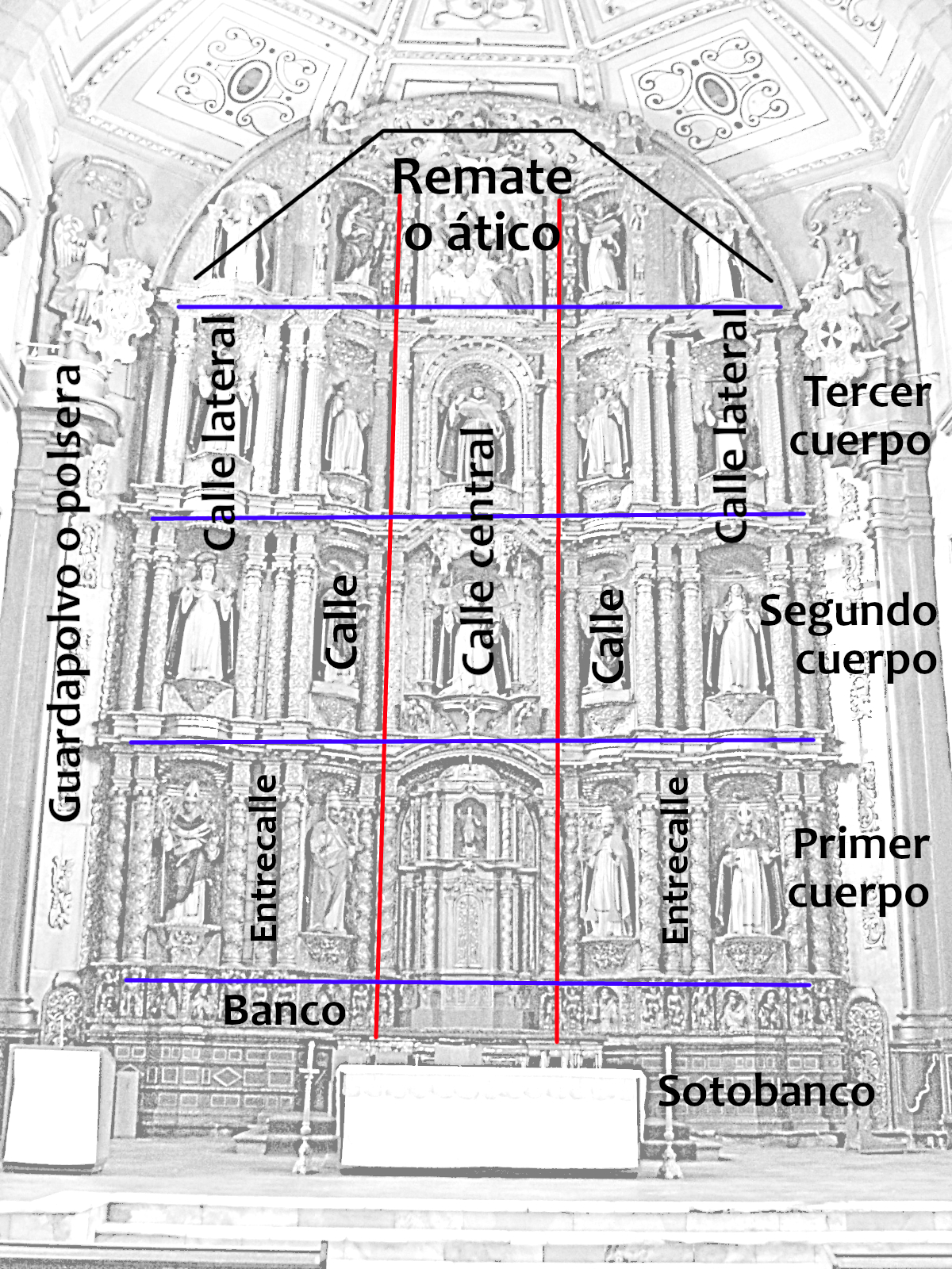 Composición básica de un retablo, tomando como base el Retablo del Templo de Santo Domingo, Puebla. Basado en el archivo de Roberto M. Garza, en